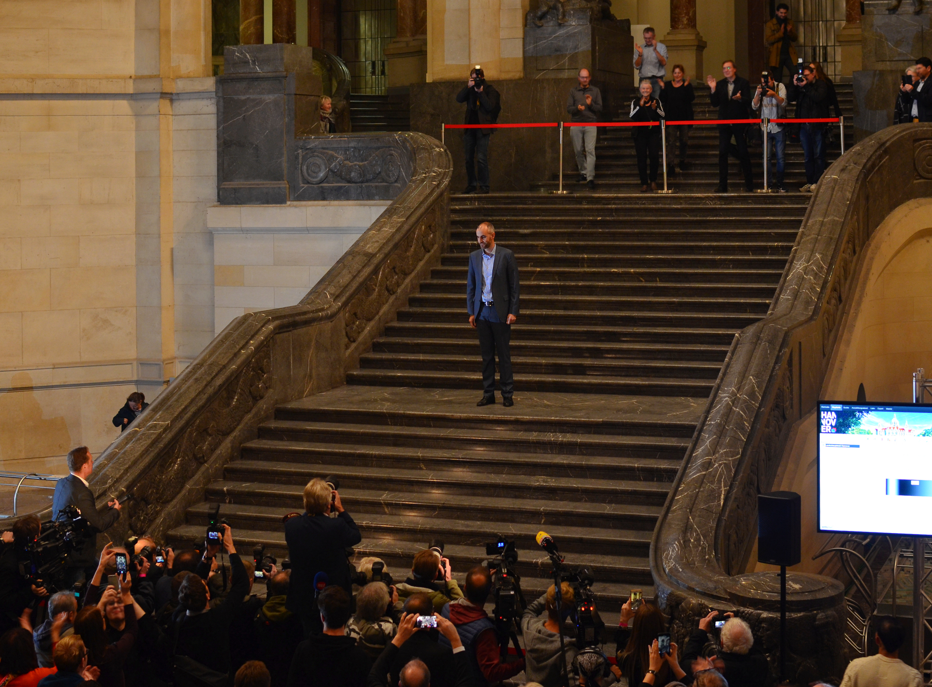 Belit Onay auf der Treppe des Neuen Rathauses nach der Wahl zum Oberbürgermeister der Landeshauptstadt Hannover